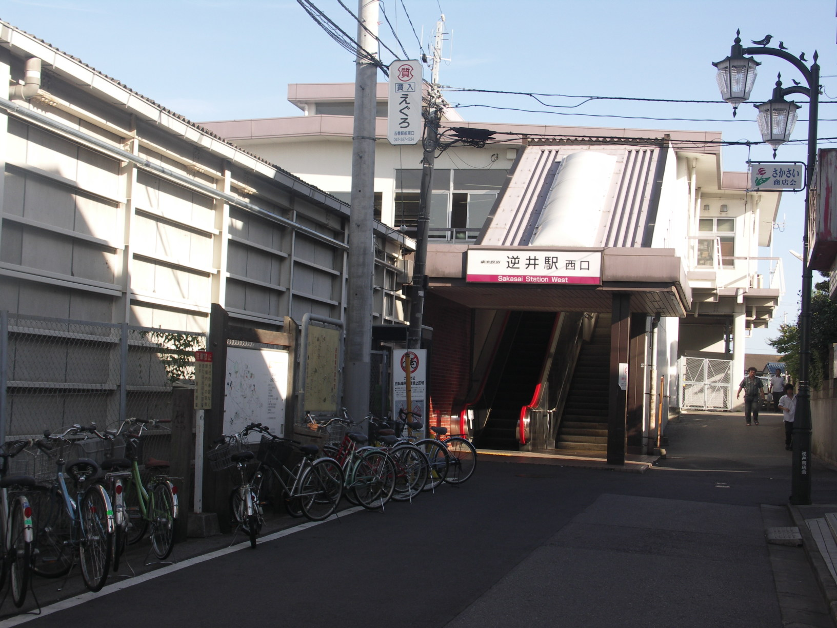 Sakasai station west, Tobu-Noda Line, Chiba, Japan, 逆井駅西口